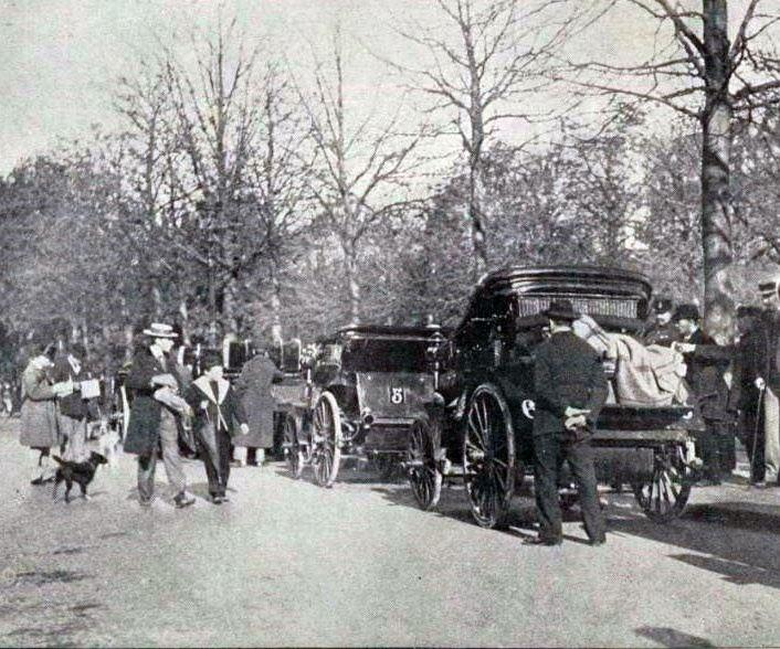 Panhard & Levassor (Levassor) et 6 (Mayade), Paris-Marseille-Paris 1896 (avant le départ, avenue de la Grande Armée) - Le Sport universel illustré du 15 octobre 1896, p.314-316